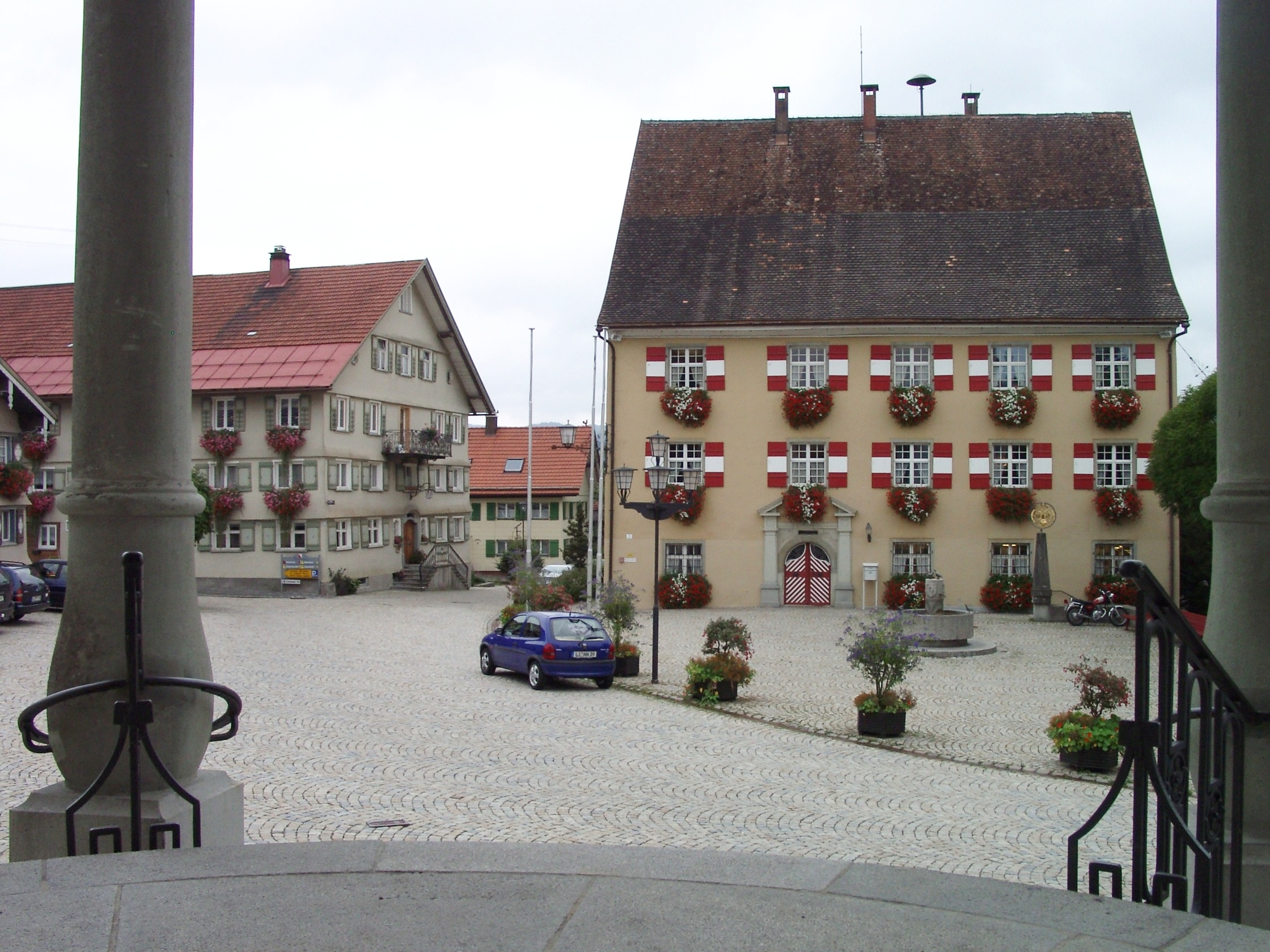 Das Rathaus in Weiler (Allgäu) (rechts) vom Eingang der Kirche St. Blasius aus gesehen. Das ehemalige kaiserlich-österreichische Amtshaus aus dem jahre 1681 und spätere Gasthaus „Zum Lamm“ wurde 1922-1923 von Baumeister Georg Bufler zum neuen Rathaus umgebaut